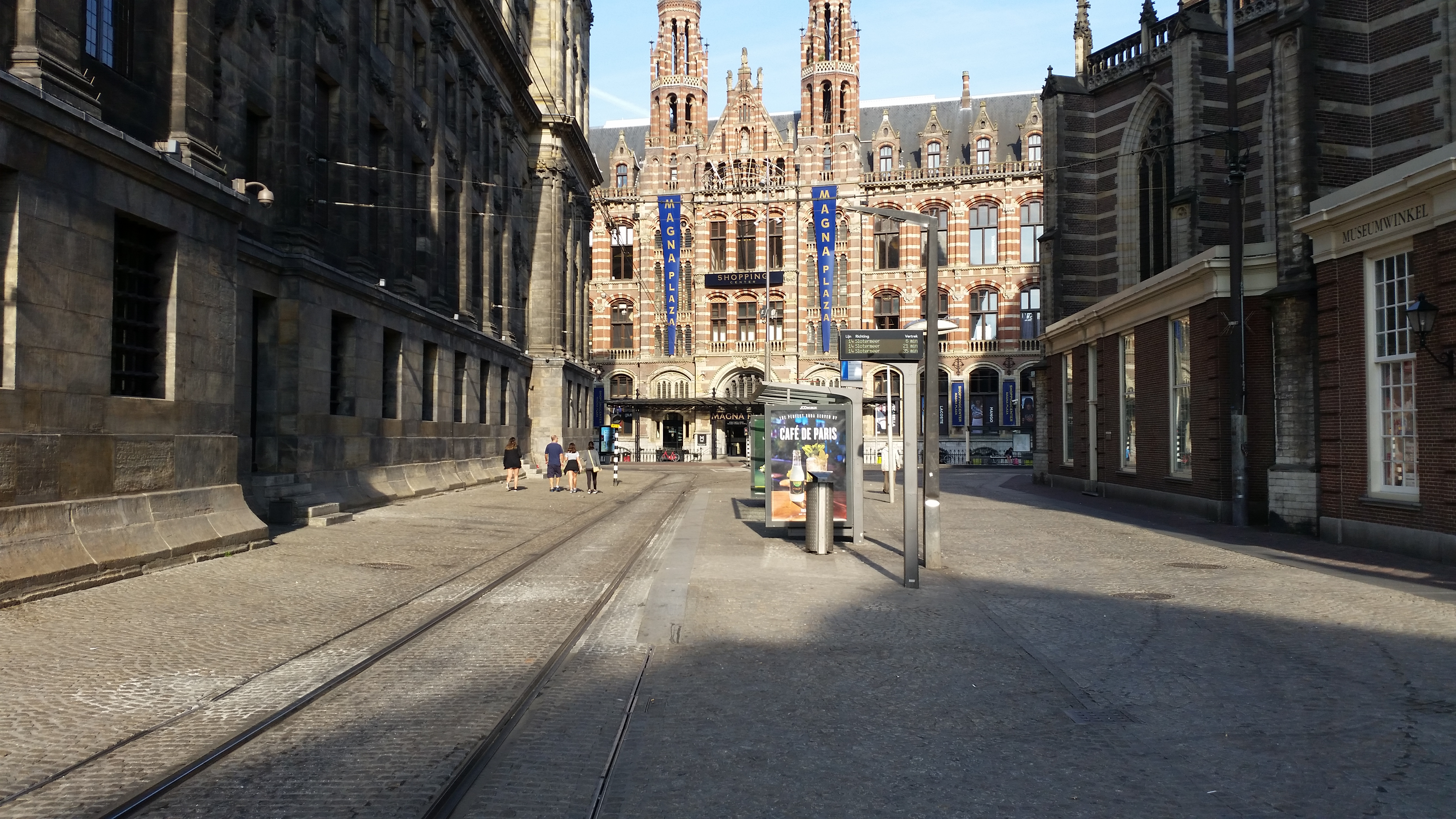 Tram 14 in 2018 had een aparte halte naar het westen in de Mozes en Aronstraat